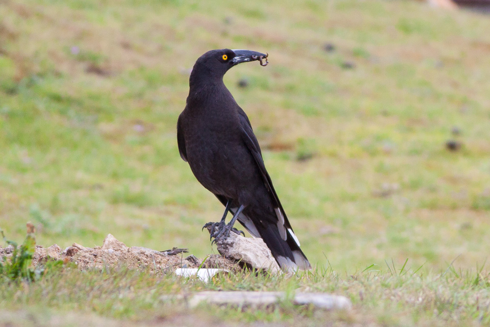 Maria Island, Tasmania